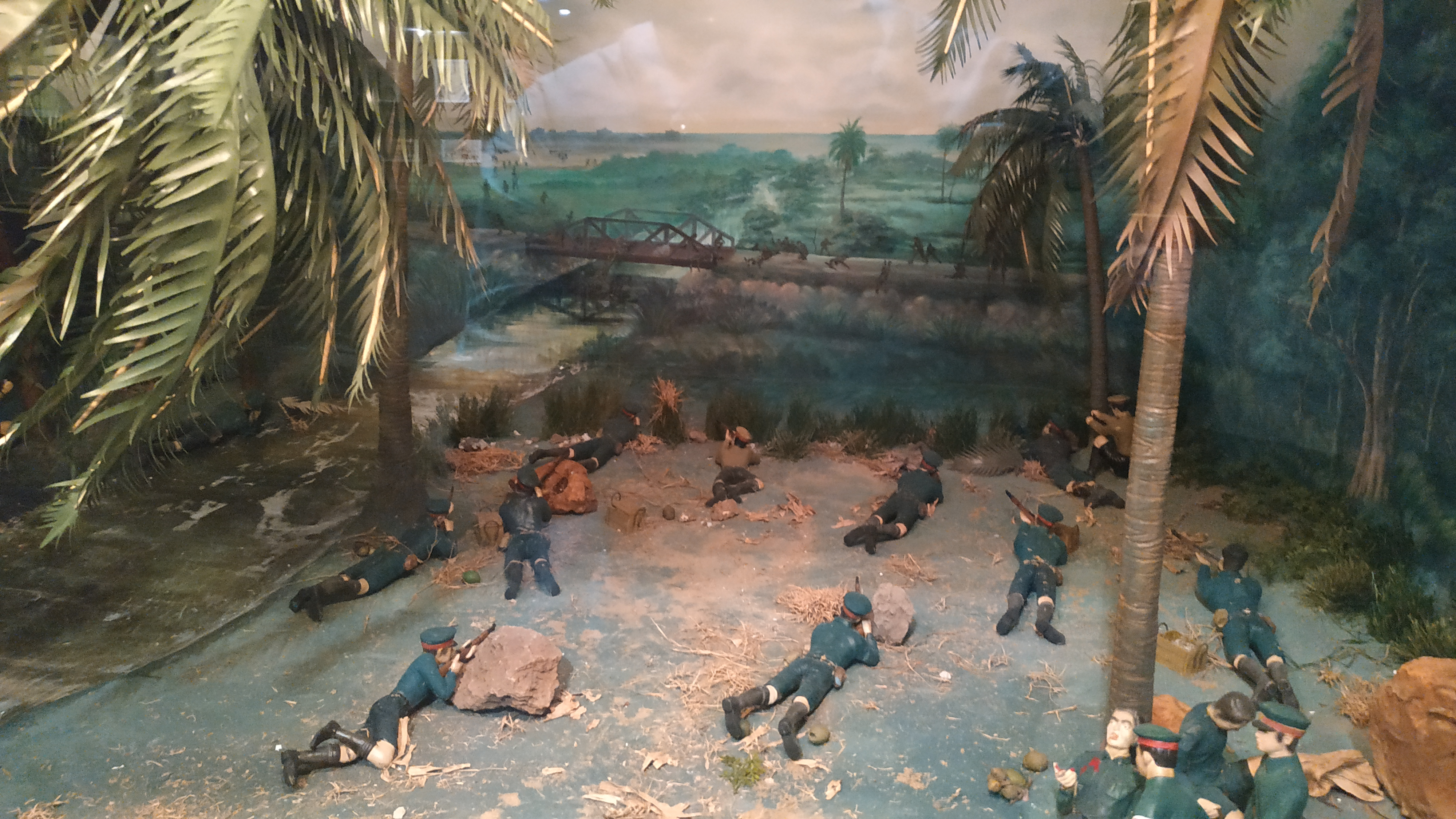 ฉากจำลองเหตุการณ์การรบของยุวชนทหารและตำรวจสนามที่เชิงสะพานท่านางสังข์ จัดแสดงอยู่ที่ชั้น 3 อาคารอนุสรณ์สถานแห่งชาติ ตำบลคูคต อำเภอลำลูกกา จังหวัดปทุมธานี การรบที่สะพานท่านางสังข์เป็นส่วนหนึ่งของเหตุการณ์กองทัพญี่ปุ่นบุกประเทศไทยในช่วงสงครามโลกครั้งที่ 2 โดยเหตุการณ์เกิดขึ้นในพื้นที่เชิงสะพานท่านางสังข์ อำเภอเมืองชุมพร จังหวัดชุมพร เมื่อเวลาเช้าของวันที่ 8 ธันวาคม พ.ศ. 2484 ซึ่งเป็นวันที่กองทัพจักรวรรดิญี่ปุ่นปฏิบัติยกพลขึ้นบกตามหัวเมืองชายฝั่งทะเลจังหวัดต่างๆ ของไทย โดยดำเนินการไปพร้อมกันกับปฏิบัติการโจมตีอ่าวเพิร์ลในรัฐฮาวาย ประเทศสหรัฐอเมริกา (ยังคงเป็นวันที่ 7 ธันวาคม ค.ศ. 1941 ในพื้นที่ฝั่งมหาสมุทรแปซิฟิก) ในมุมขวาล่างของฉากจำลองเหตุการณ์ดังกล่า จะเห็นสิบเอกนยำราญ ควรพันธ์ (ภายหลังได้รับพระราชทานเลื่อนยศเป็นนายทหารสัญญาบัตร ชั้นยศร้อยโท) ครูฝึกหน่วยยุวชนทหารที่ 52 โรงเรียนศรียาภัย จังหวัดชุมพร ทำหน้าที่บัญชาการหน่วยยุวชนทหารในการต่อสู้แทนร้อยเอกถวิล นิยมเสน (ภายหลังได้รับพระราชทานเลื่อนยศเป็นพันโท) ผู้บังคับหน่วยฝึกยุวชนทหารที่ 52 ซึ่งเสียชีวิตระหว่างการรบ แม้ว่าตนเองจะบาดเจ็บ โดยมียุวชนทหารคอยช่วยปฐมพยาบาลอยู่ด้วย การรบได้ยุติลงในช่วงเวลาประมาณเที่ยงวันของวันเดียวกัน เนื่องจากรัฐบาลไทยได้ตัวสินใจยอมให้ญี่ปุ่นยกทัพผ่านประเทศไทยไปตีพท่าและมลายูของอังกฤษ เพื่อรักษาชีวิตของพลเมืองไทยไว้ เหตุการณ์ดังกล่าวจึงถือเป็นวีรกรรมครั้งสำคัญของยุวชนทหาร ที่ได้ปฏิบัติหน้าที่ป้องกันประเทศด้วยความกล้าหาญและความเสียสละ ภายหลังเมื่อมีการก่อตั้งนักศีกษาวิชาทหารเพื่อฝึกหัดวิชาทหารให้แก่เยาวชนแทนองค์กรยุวชนทหารซึ่งถูกยุบลงหลังสิ้นสงครามโลกครั้งที่ 2 จึงได้มีการกำหนดให้วันที่ 8 ธันวาคมของทุกปี เป็นวันนักศึกษาวิชาทหาร เพื่อรำลึกถึงวีรกรรมของยุวชนทหารสืบมาจนถึงทุกวันนี้